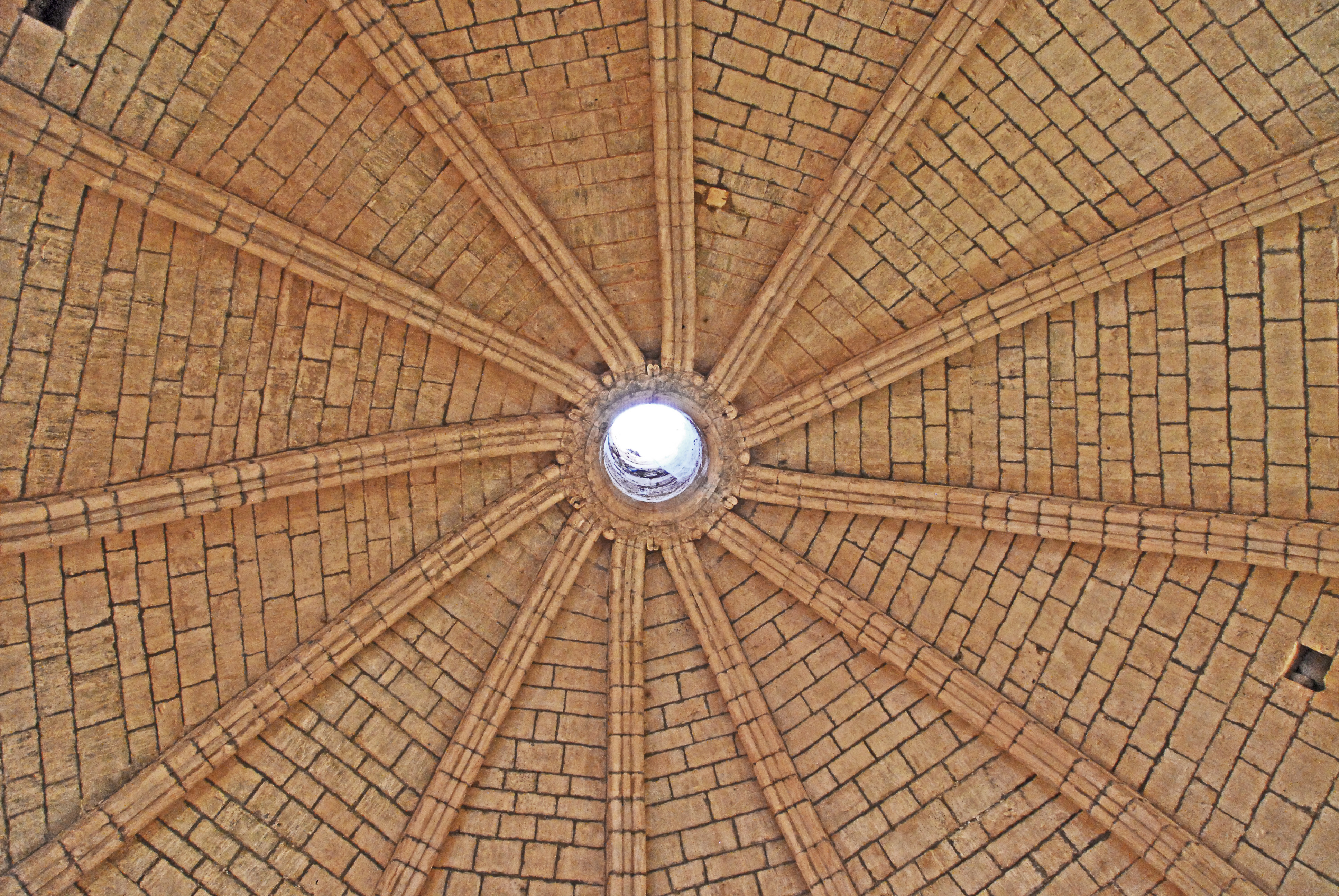 Chateau de Simiane-la-Rotonde, Kuppel der Rotunde